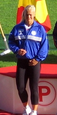 Taina Kolkkala Kalevan kisoissa, Ratinan stadionilla, Tampereella, 26. heinäkuuta 2008